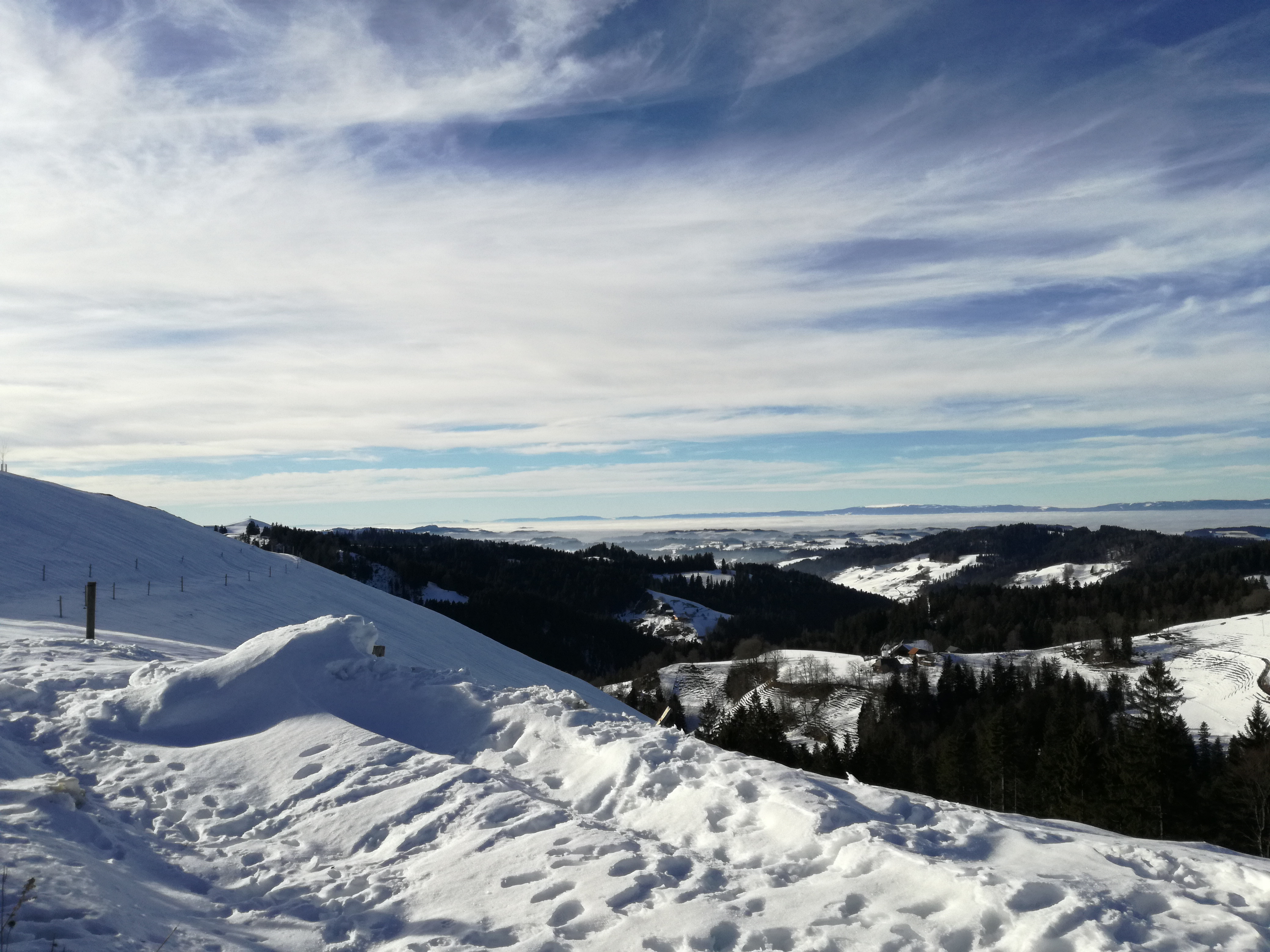 Ausblick vom Restaurant Brestenegg Richtung Nordwesten